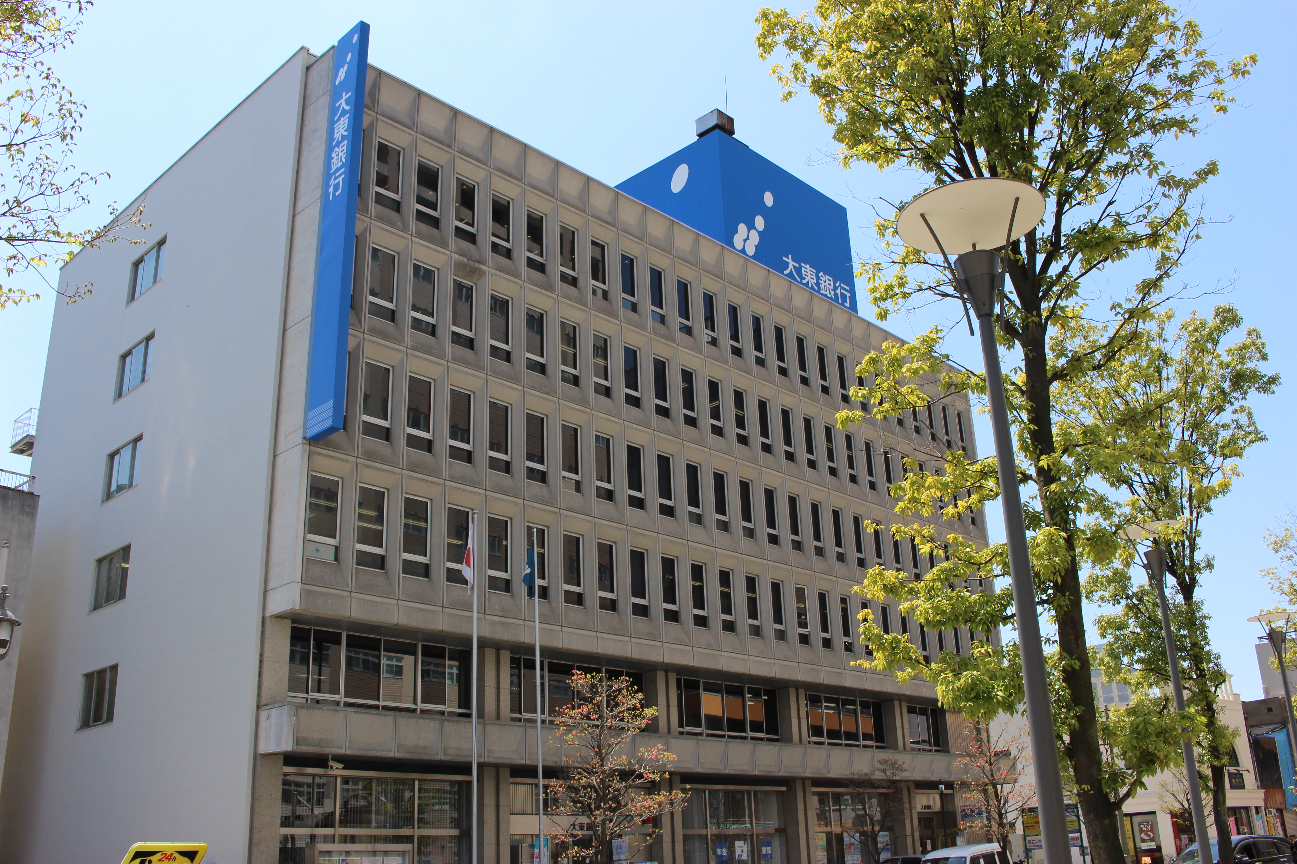 大東銀行本店（郡山市）